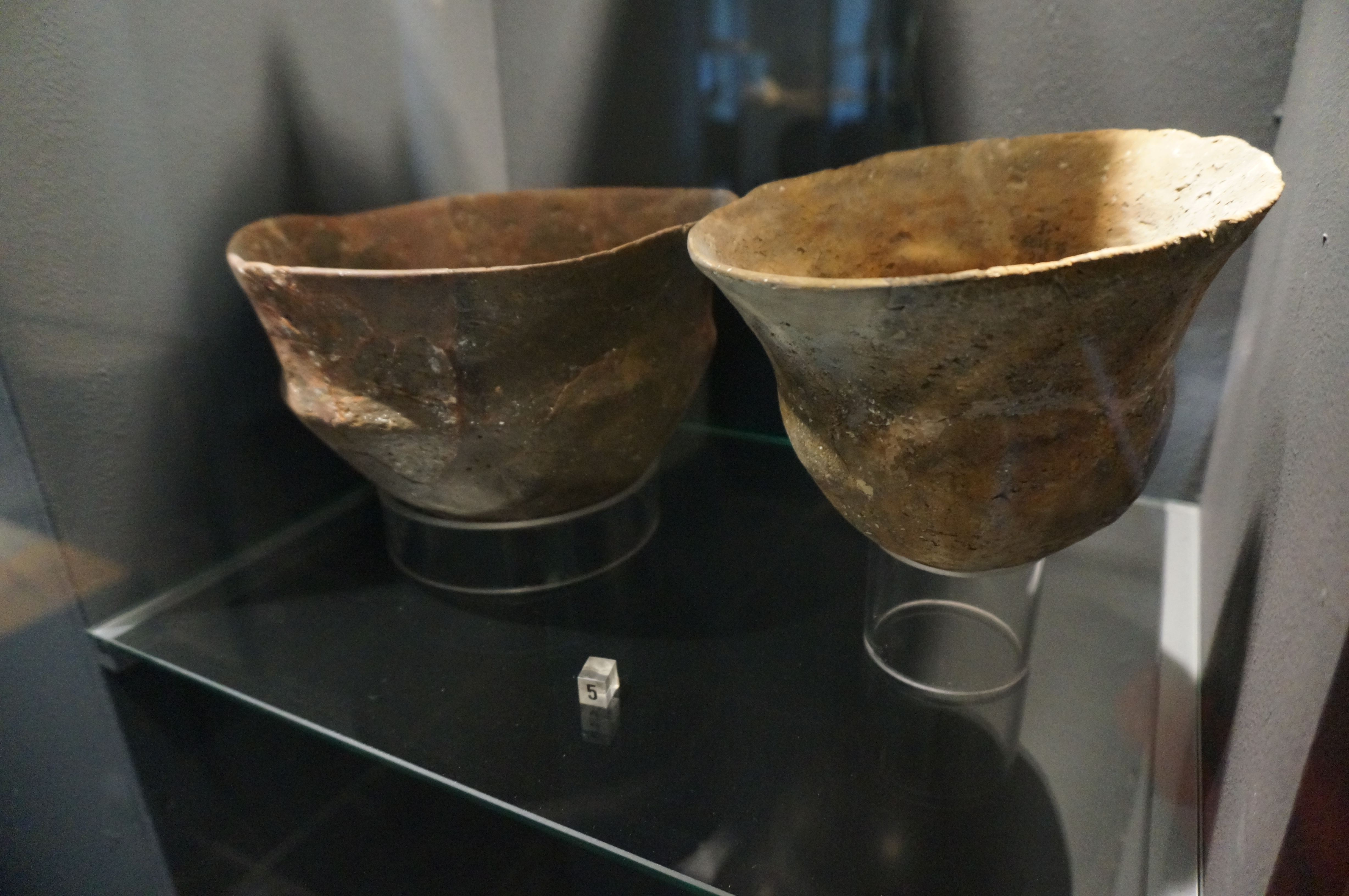 Découvert à Mairy, un vase de la culture de Michelsberg .